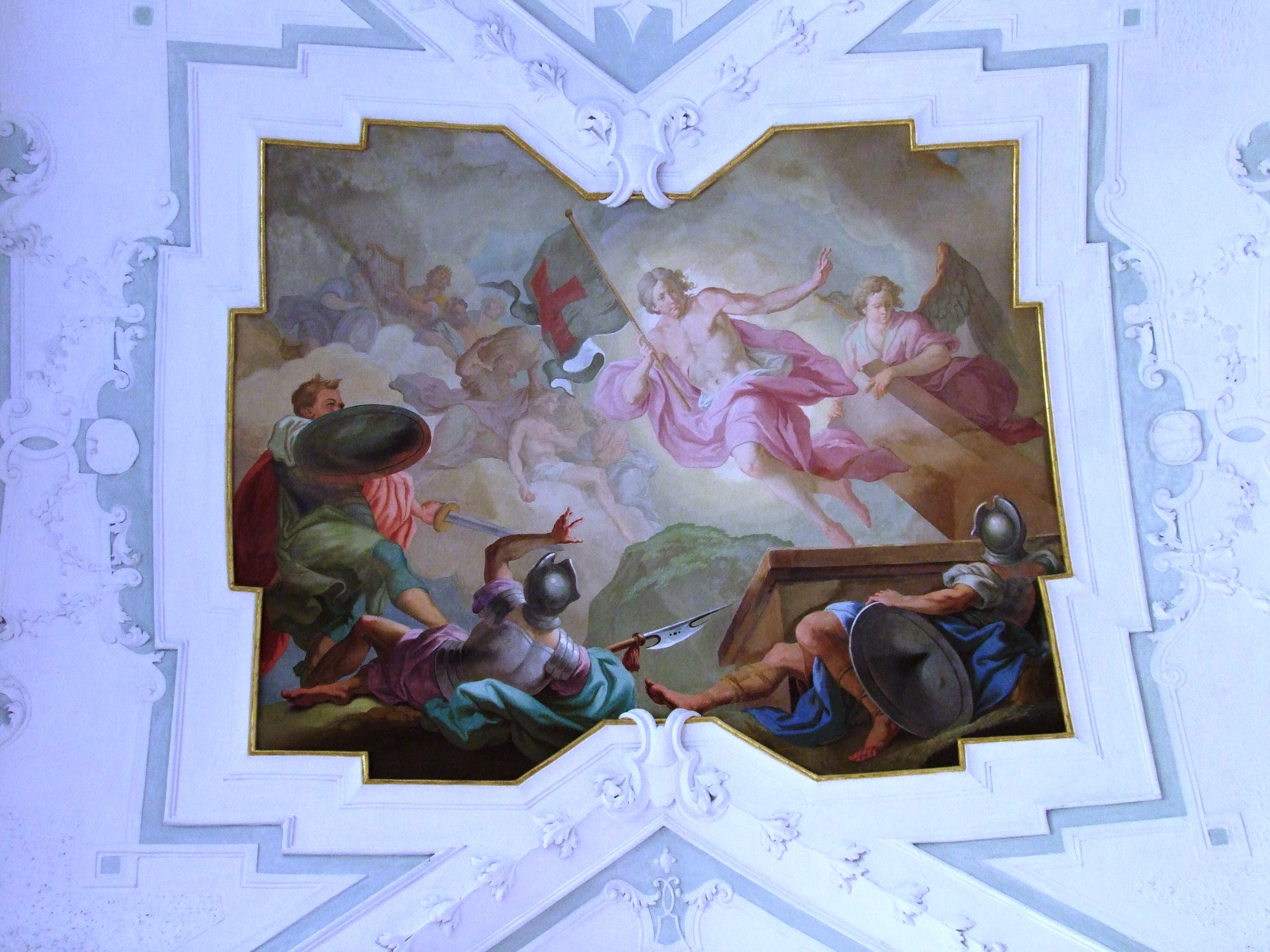 St. Georg, ehemalige Klosterkirche des oberschwäbischen Klosters Ochsenhausen